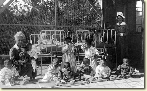 בית חולים לילדים של הצלב האדום בירושלים, 1919